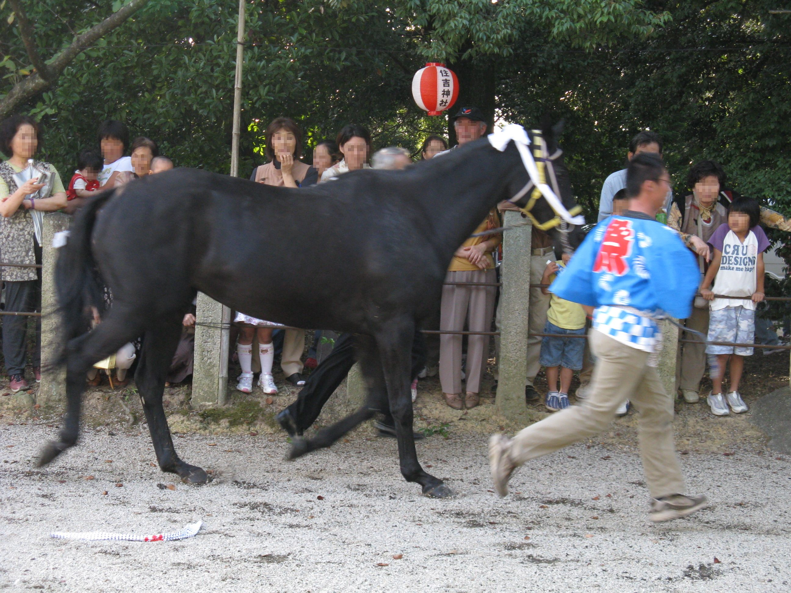 大阪府河内長野市住吉神社の馬駆神事